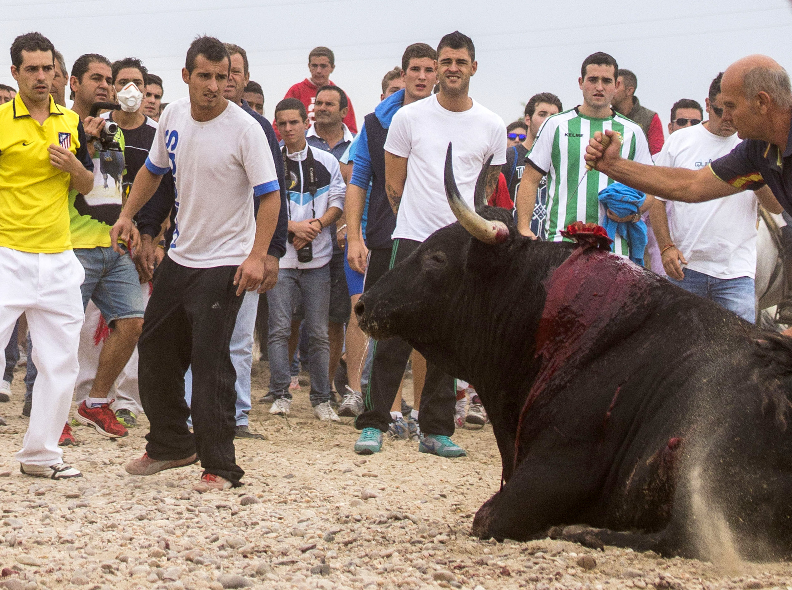 Imágenes del asesinato de Elegido, Toro de la Vega 2014 en Tordesillas. PACMA ha vuelto a infiltrarse para distribuir a los medios y mostrar al mundo la infamia que anualmente se produce en Tordesillas, contra la que el Partido Animalista lleva 9 años luchando para conseguir su prohibición. Nuestro fotógrafo ha sido amenazado y agredido varias veces y han intentado romper su cámara, con el objetivo de evitar que tomara imágenes de la muerte del animal. Trabajaremos hasta conseguir el fin de esta lacra amparada por el PSOE y PP.